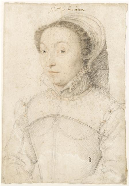 Françoise Robertet (1519-1580), épouse de Jean Babou de la Bourdaiseière